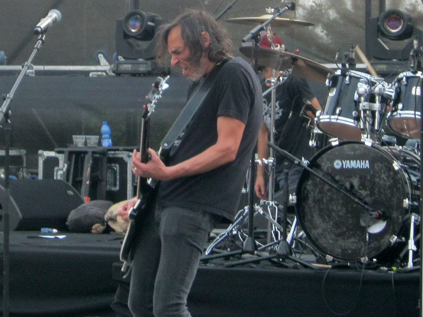 Israeli rock band, Eifo HaYeled? Stutent's festival. Tel Aviv University, 2016